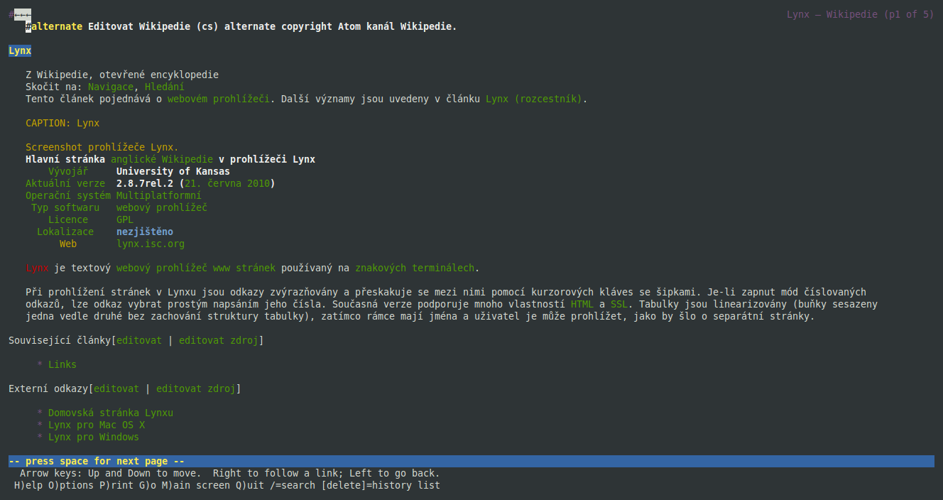 České Wikipedie v prohlížeči Lynx.